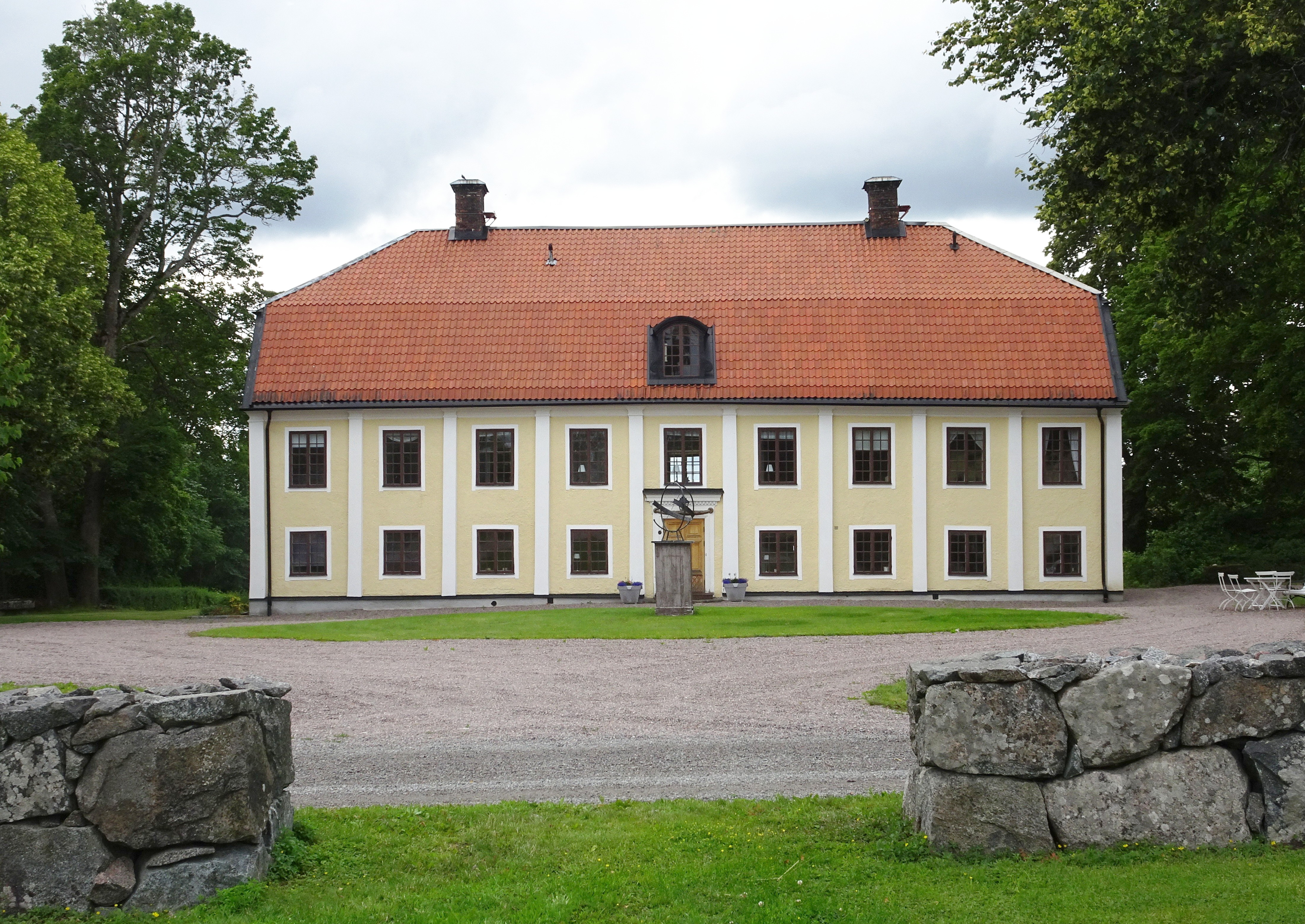 Hallkved gård, Uppsala kommun